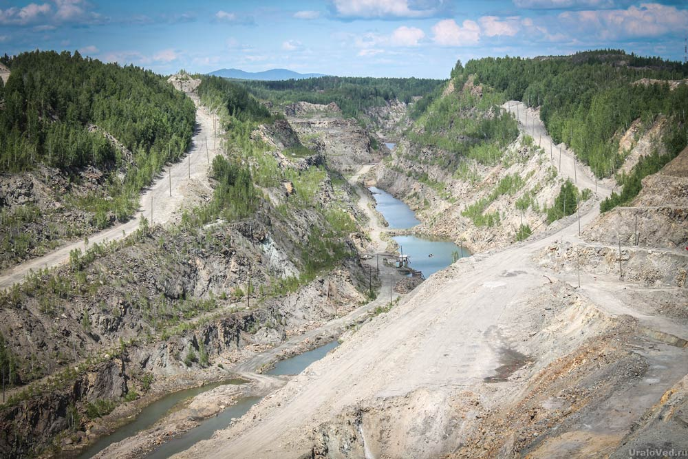 Графитовый карьер в посёлке Тайгинка